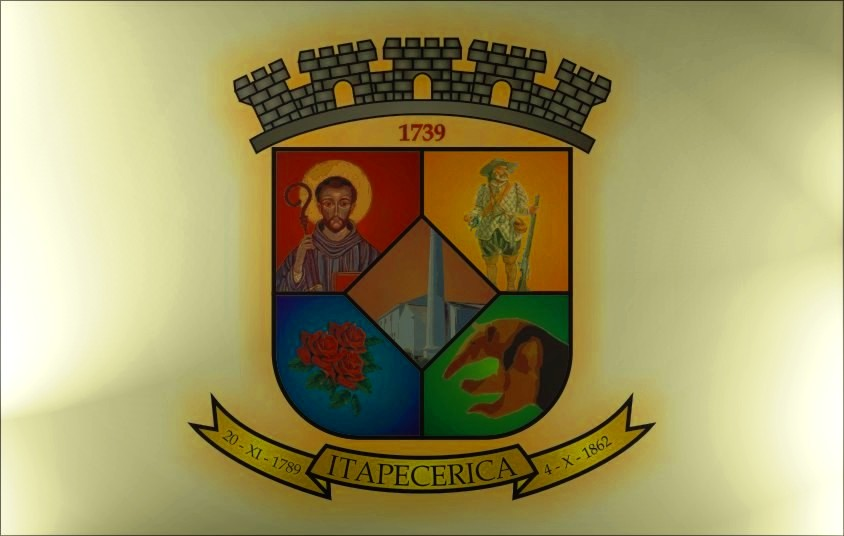 Esta é a bandeira da cidade de Itapecerica-MG. Não é a bandeira original, mas sim seu desenho através do programa Corel Draw.